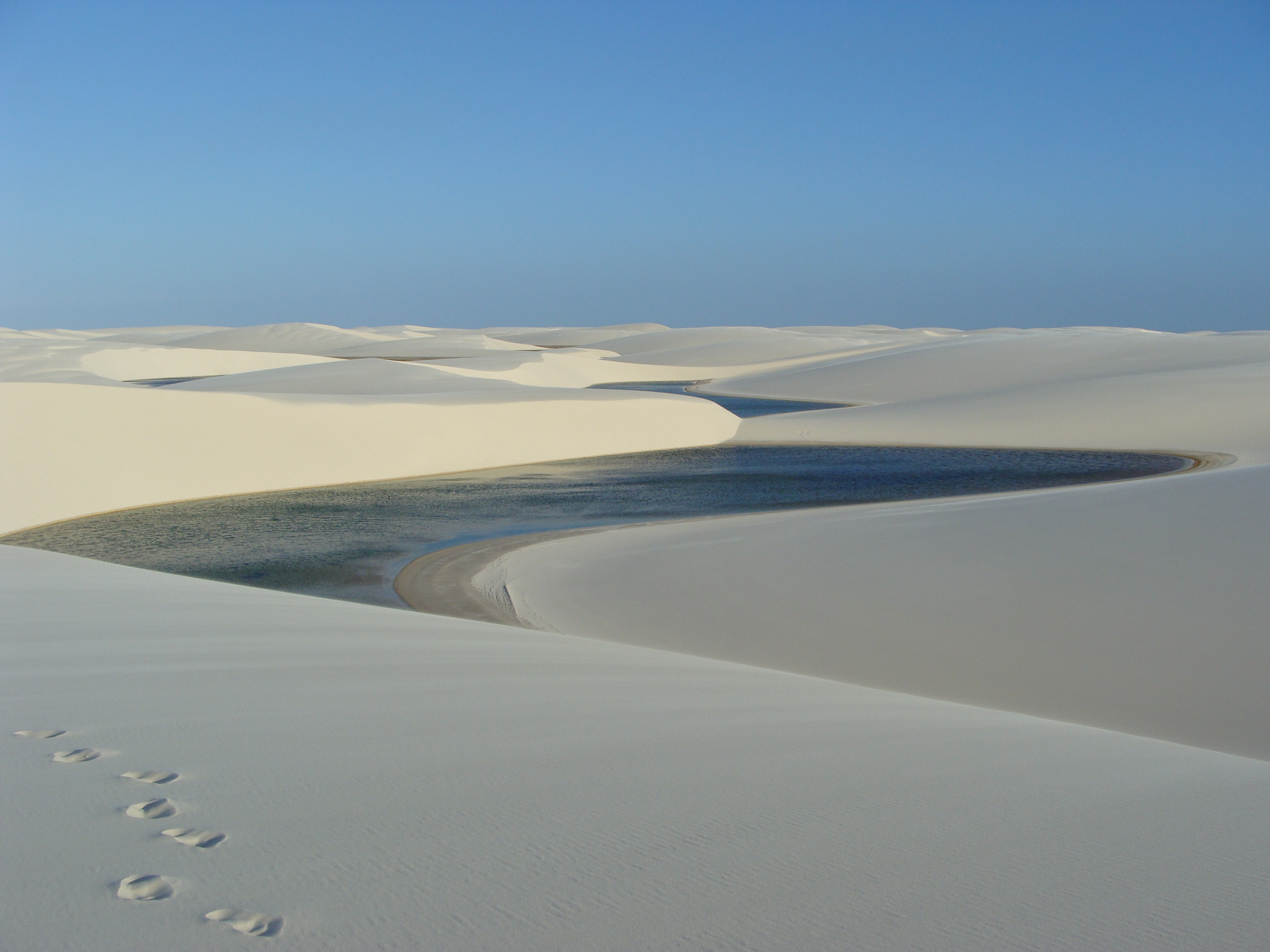 Vista geral da Lagoa Andorinha pelo lado leste